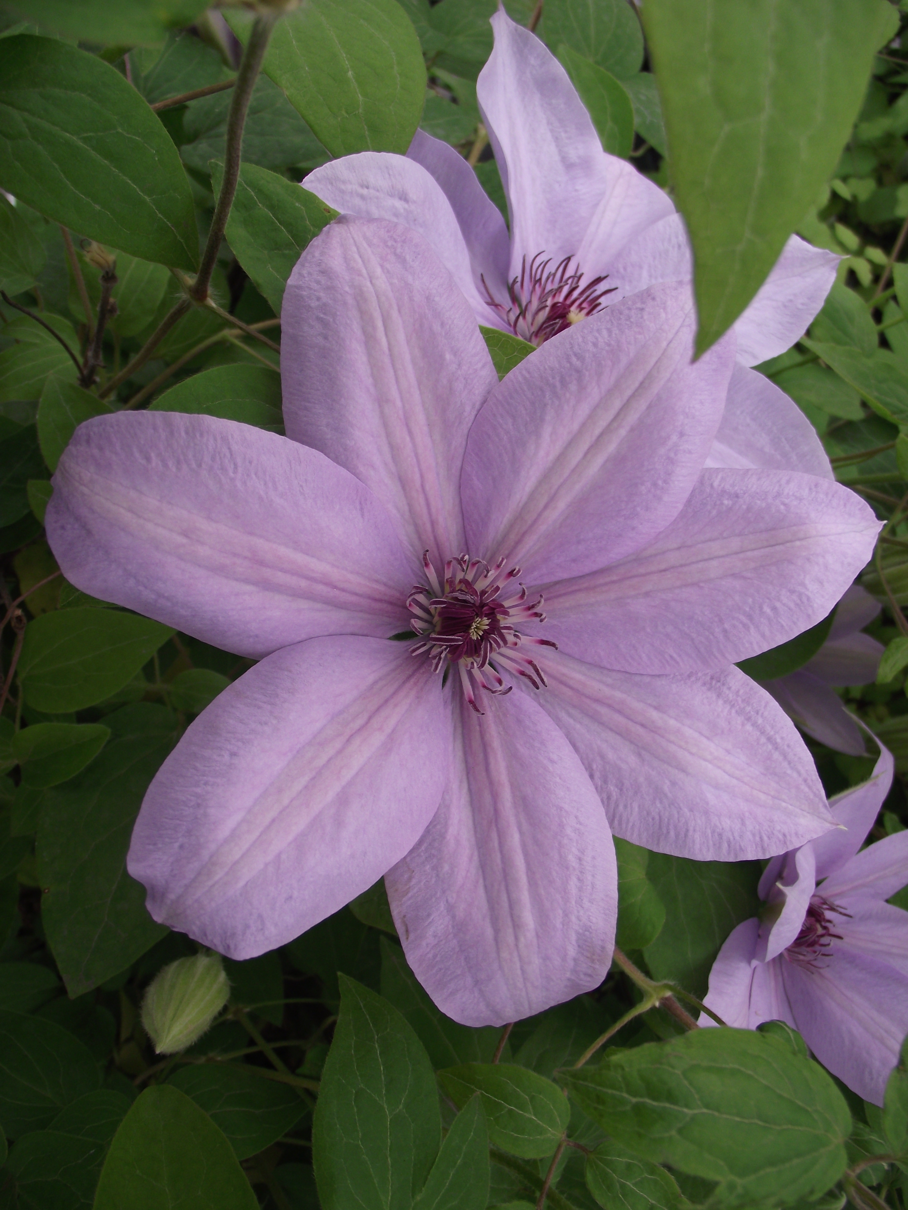 Clematite Patens X Bernardine™ Evipo061, cultivar à grande fleur